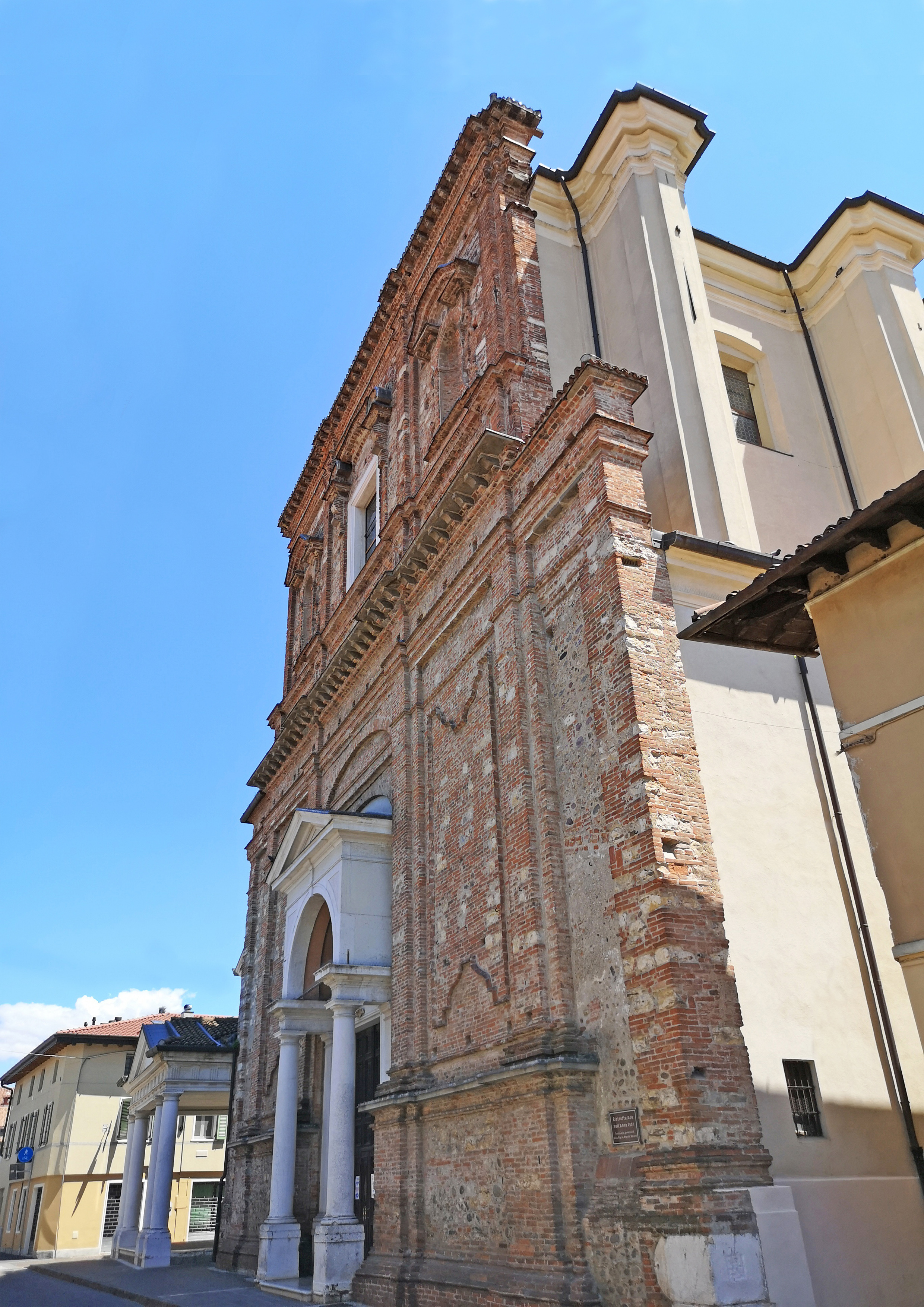 Facciata della Chiesa dei Santi Pietro e Paolo a Travagliato.